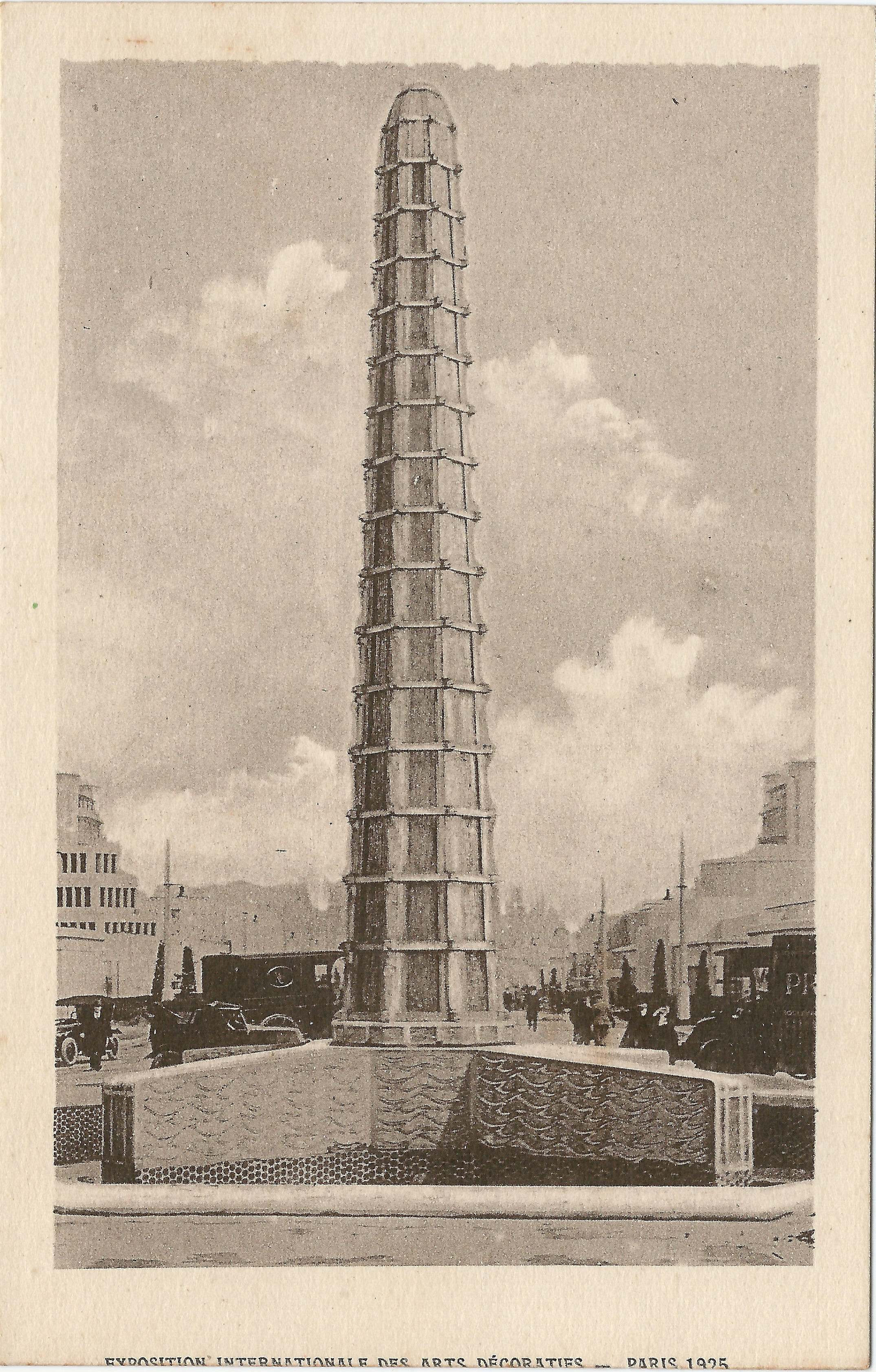 Exposition internationale des Arts décoratifs et industriels modernes de Paris en 1925